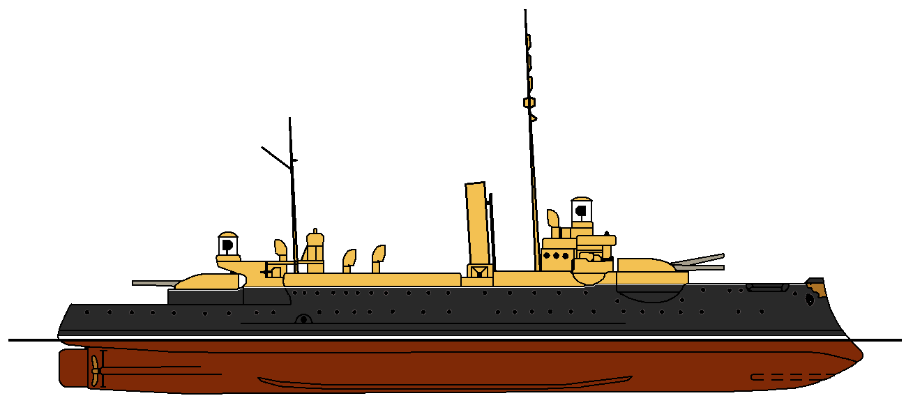 Seitenriss des deutschen Küstenpanzerschiffes SMS Siegfried im Zustand von 1890 mit der von 1878 bis 1895 gültigen Farbgebung von steuerbord.